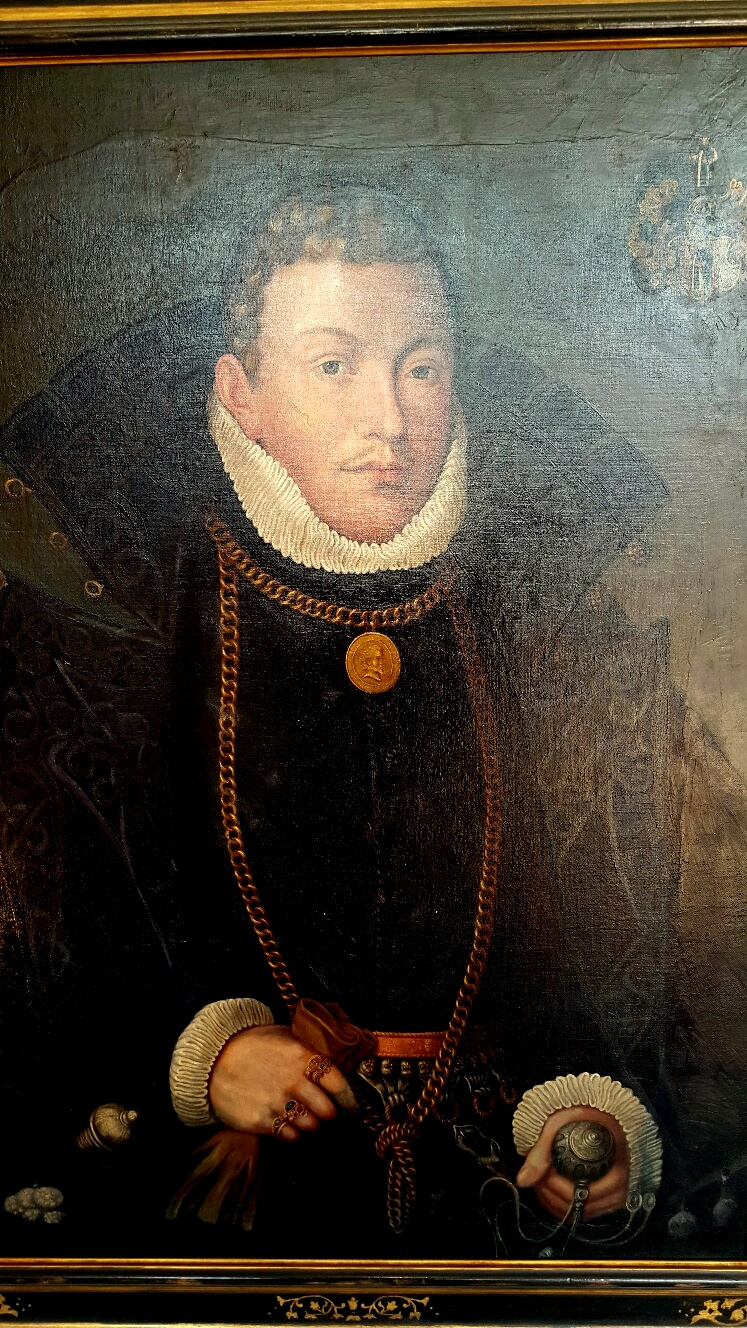 Hilmar d.J. von Münchhausen (1558-1617) Sammlung Schloss Rethmar: Georg Ehmig (um 1925): Gemäldekopie eines zeitgenössischen Portraits aus Schloss Niederschwedeldorf